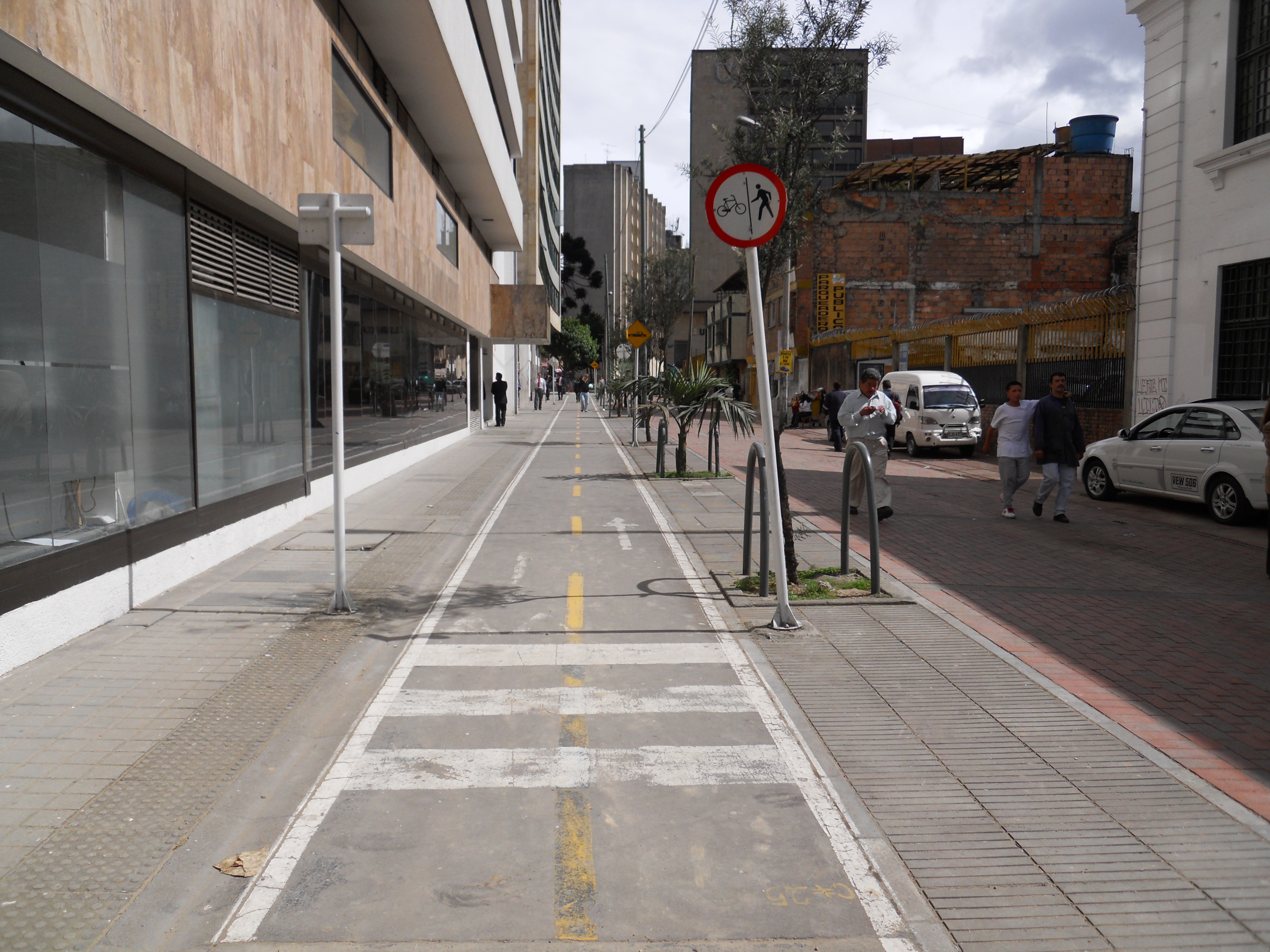 Cicloruta en el barrio La Alameda, carrera 12 con calle 25, localidad de Santa Fe en Bogotá.